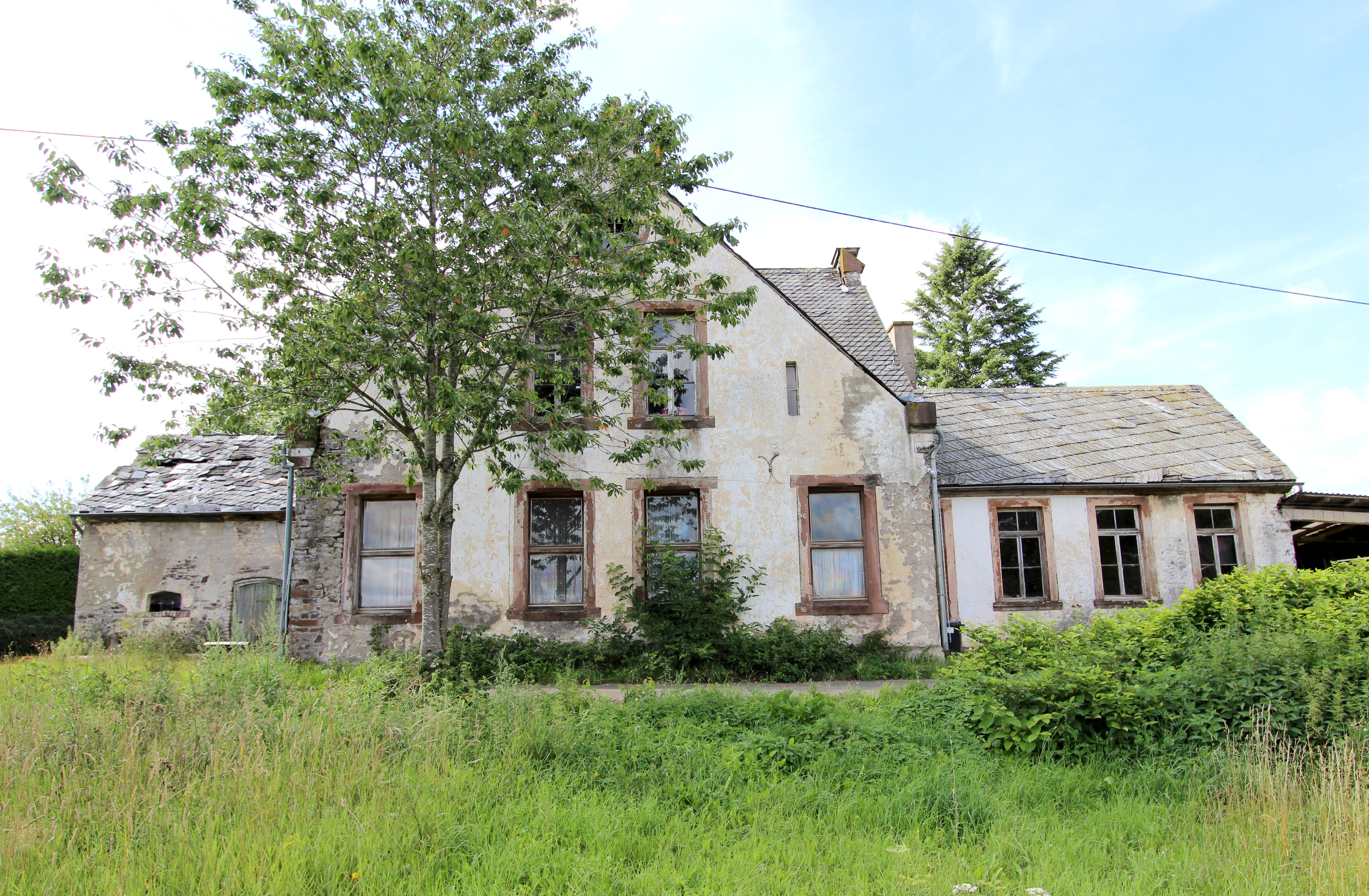 54608 Oberlascheid, Ortsstraße 14. Ehemalige Schule mit Lehrerwohnung; heute Wohnhaus, vierachsiger eingeschossiger Putzbau, 1887, eingeschossiger Putzbau mit Neurenaissance-Motiven, kurz nach 1900, Stallanbau. Aufnahme von 2017.